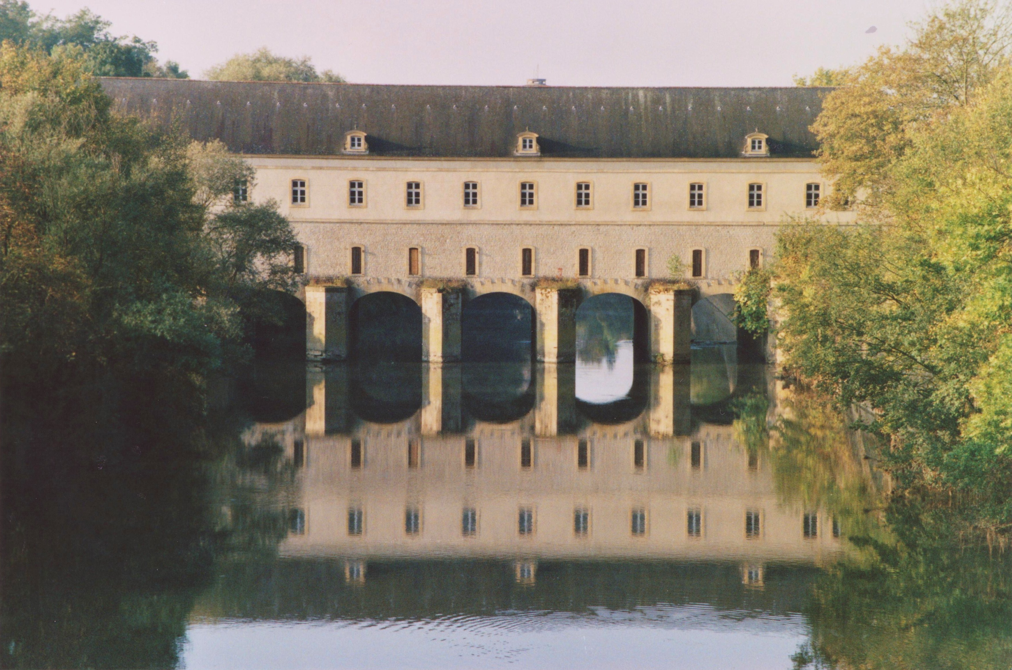 Thionville, pont-écluse